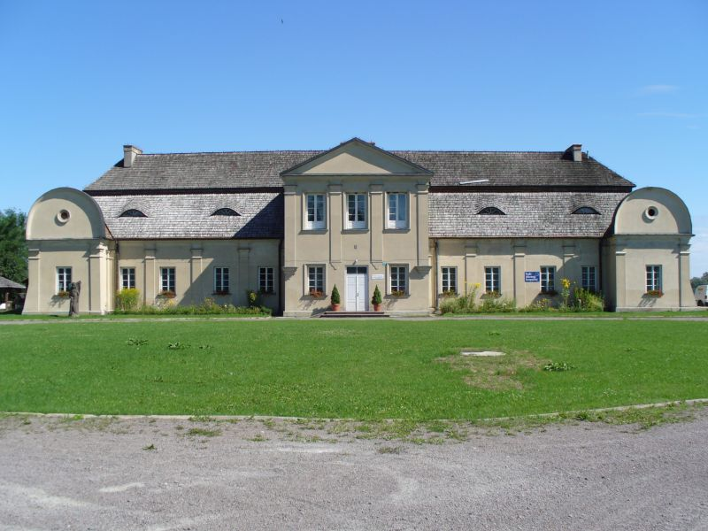 Pałac Suchodolskich w Dorohusku. Wybudowany został przez Michała Maurycego Suchodolskiego w latach 1752-1759. Rezydencja barokowa.